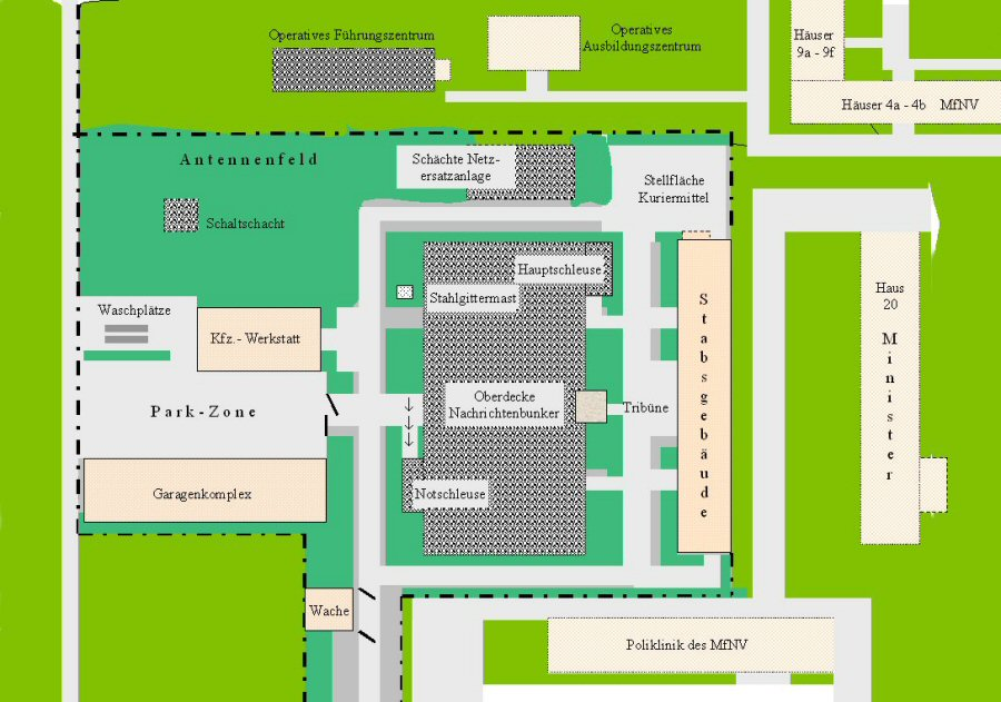 Geländeübersicht über die elemente der HptNZ im Objekt Prötzeler Chaussee des MfNV